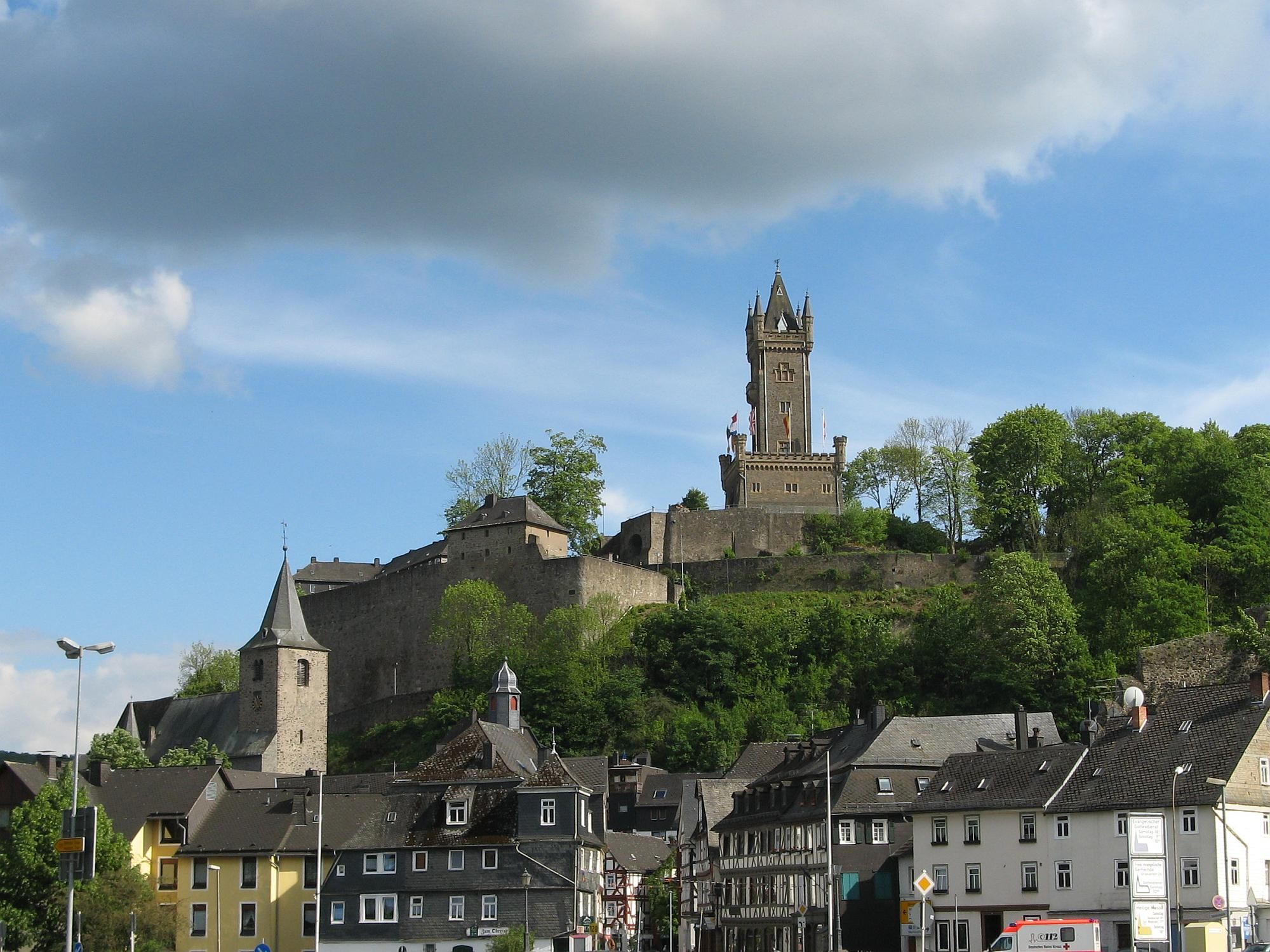 Der Wilhelmsturm auf dem Schlossberg in Dillenburg, links ist die evangelische Stadtkirche aus dem Jahre 1491